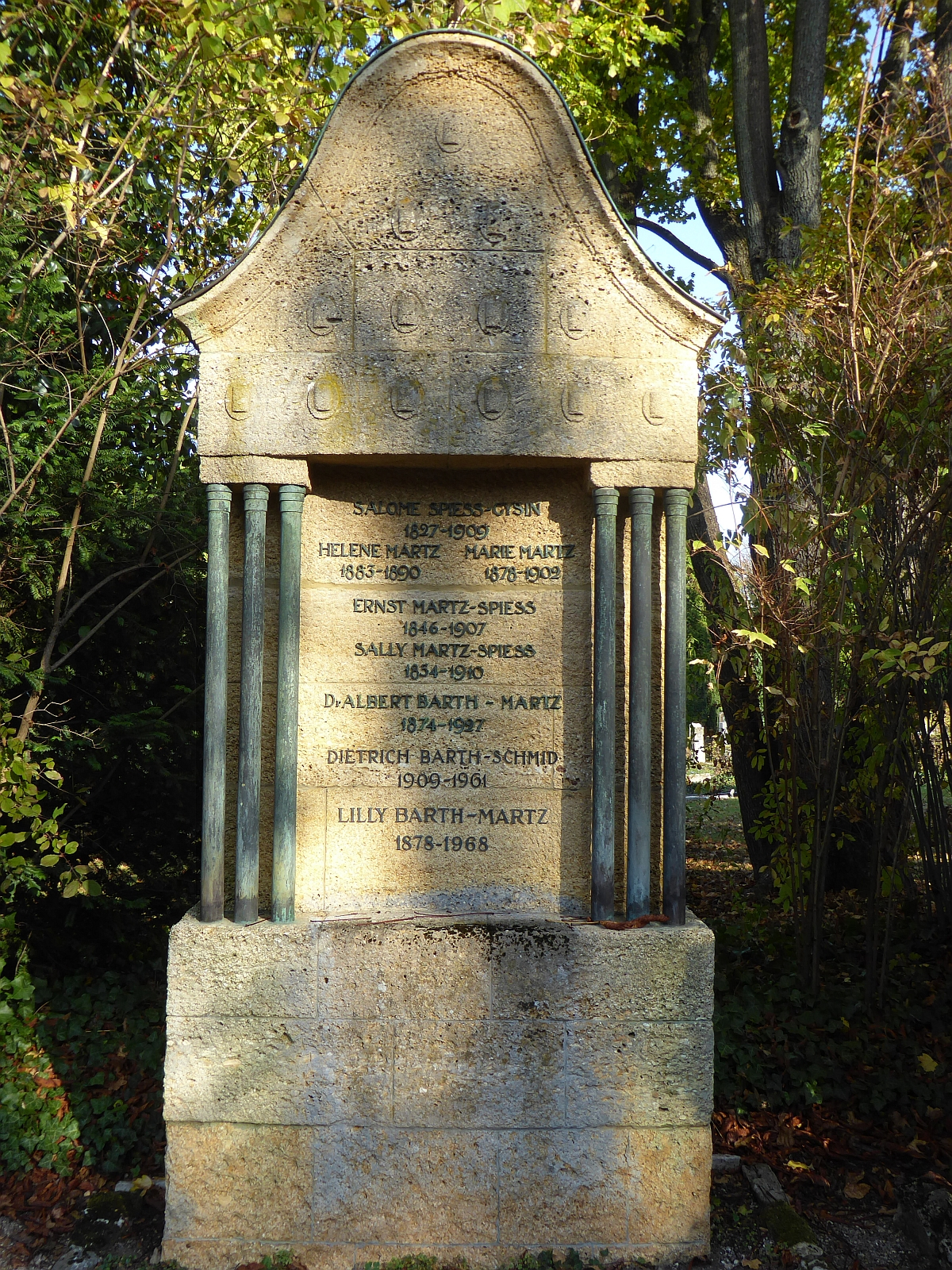 Albert Barth-Martz (1874–1927) Dr.phil. Theologe, Bildungspolitiker, Schulreformer. Grab auf dem Friedhof Wolfgottesacker, Basel